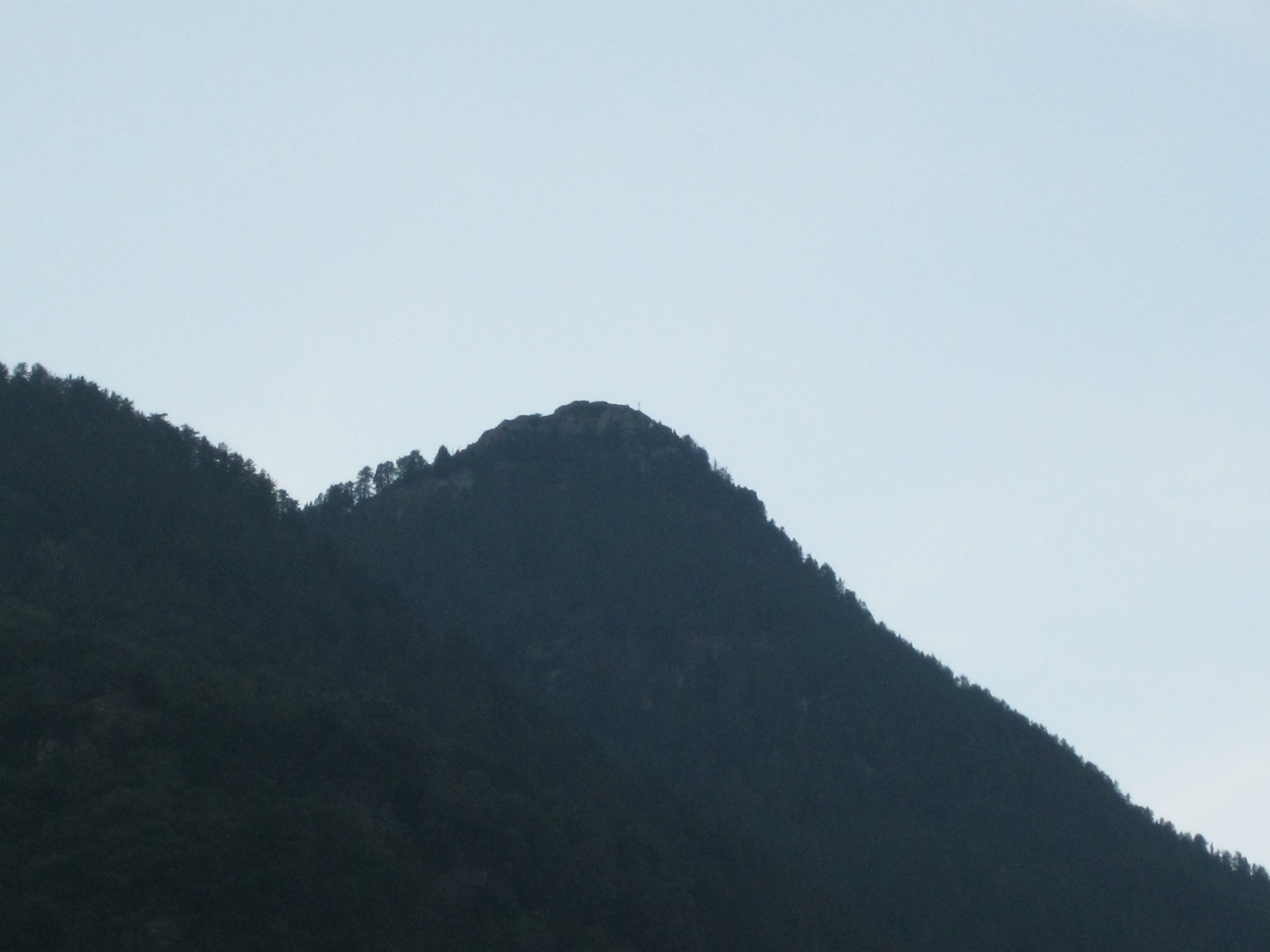 La cima di Visghed vista da Preonzo